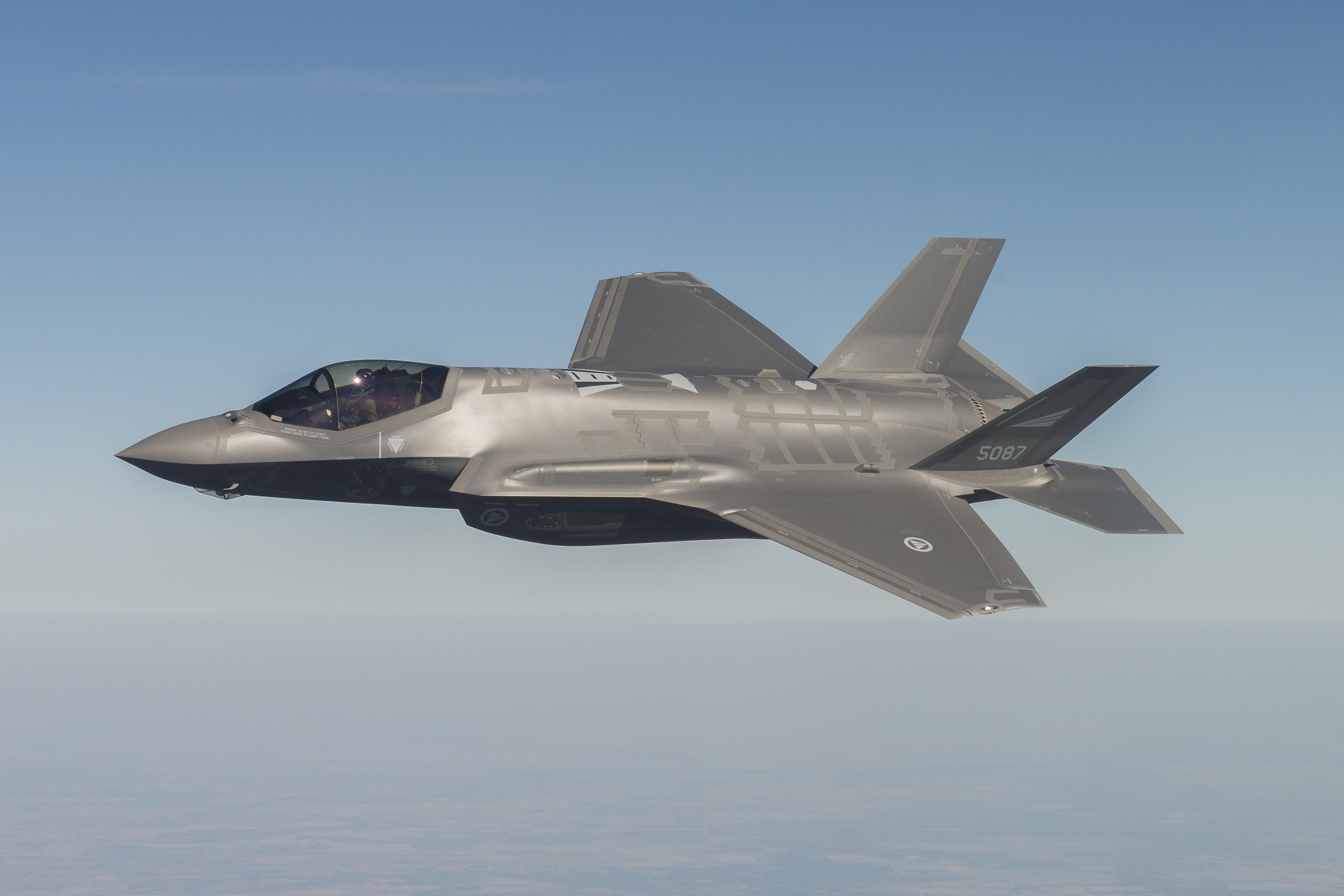 Her tester en flyger fra det amerikanske luftforsvaret Norges første F-35 (AM-1 - 5087) fra Lockheed Martins fabrikk i Fort Worth, Texas, 15. oktober. Bildene tilhører Lockheed Martin, men kan fritt brukes mot kreditering. Fotograf: Kaszynski - Images from a test flight of Norway's first F-35 taken on 15 October 2015. Photo: Kaszynzki, Lockheed Martin.